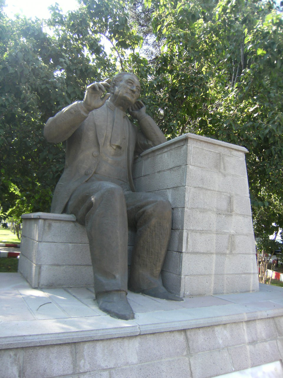 Ahmet Adnan Saygun heykeli , Ankara Güzel sanatlar genel müdürlüğü bahçesi